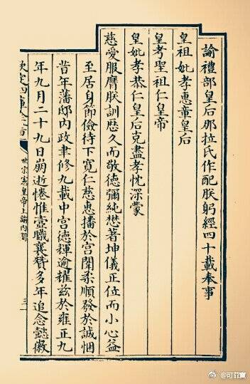 中文（台灣）: 世宗憲皇帝上諭內閣(圖片有稍微經個人作變色處理)